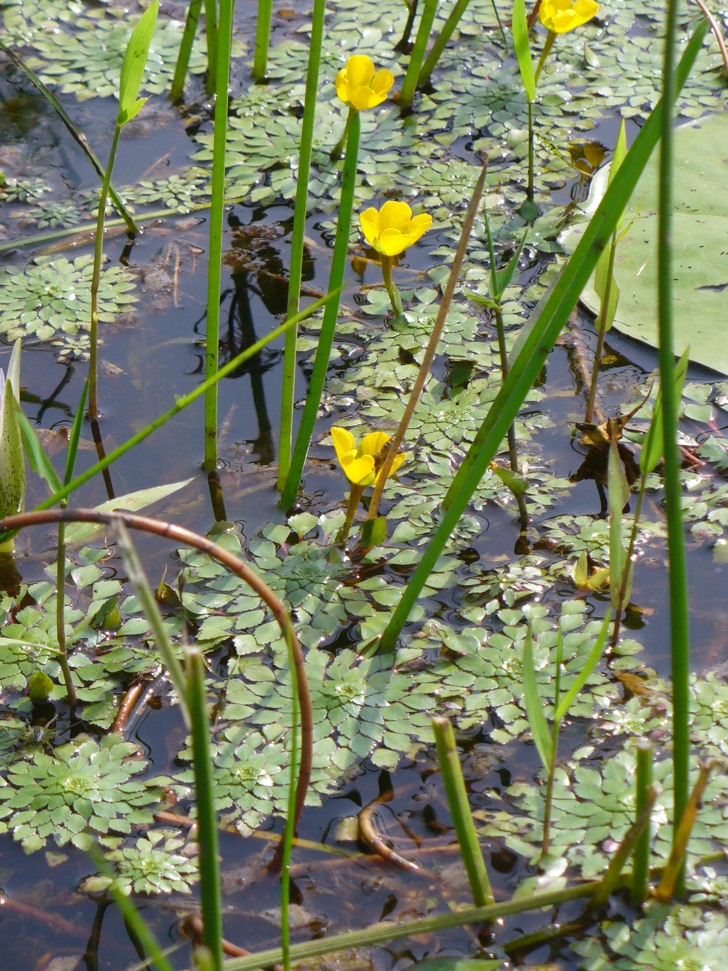 cultivated, Boa Esperanza ranch, Brazil.